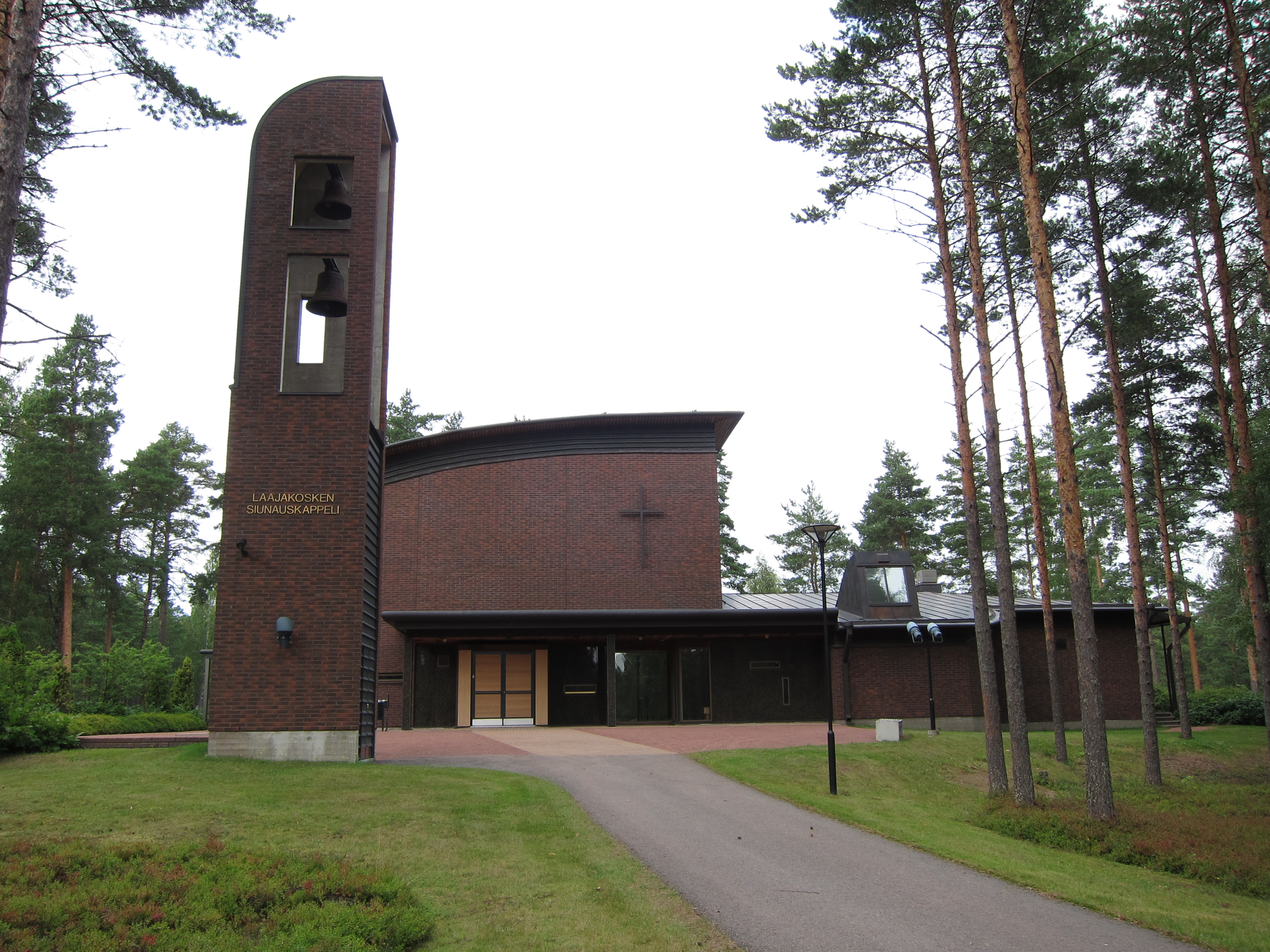 Laajakosken siunauskappeli Kotkassa Laajakosken kylässä.